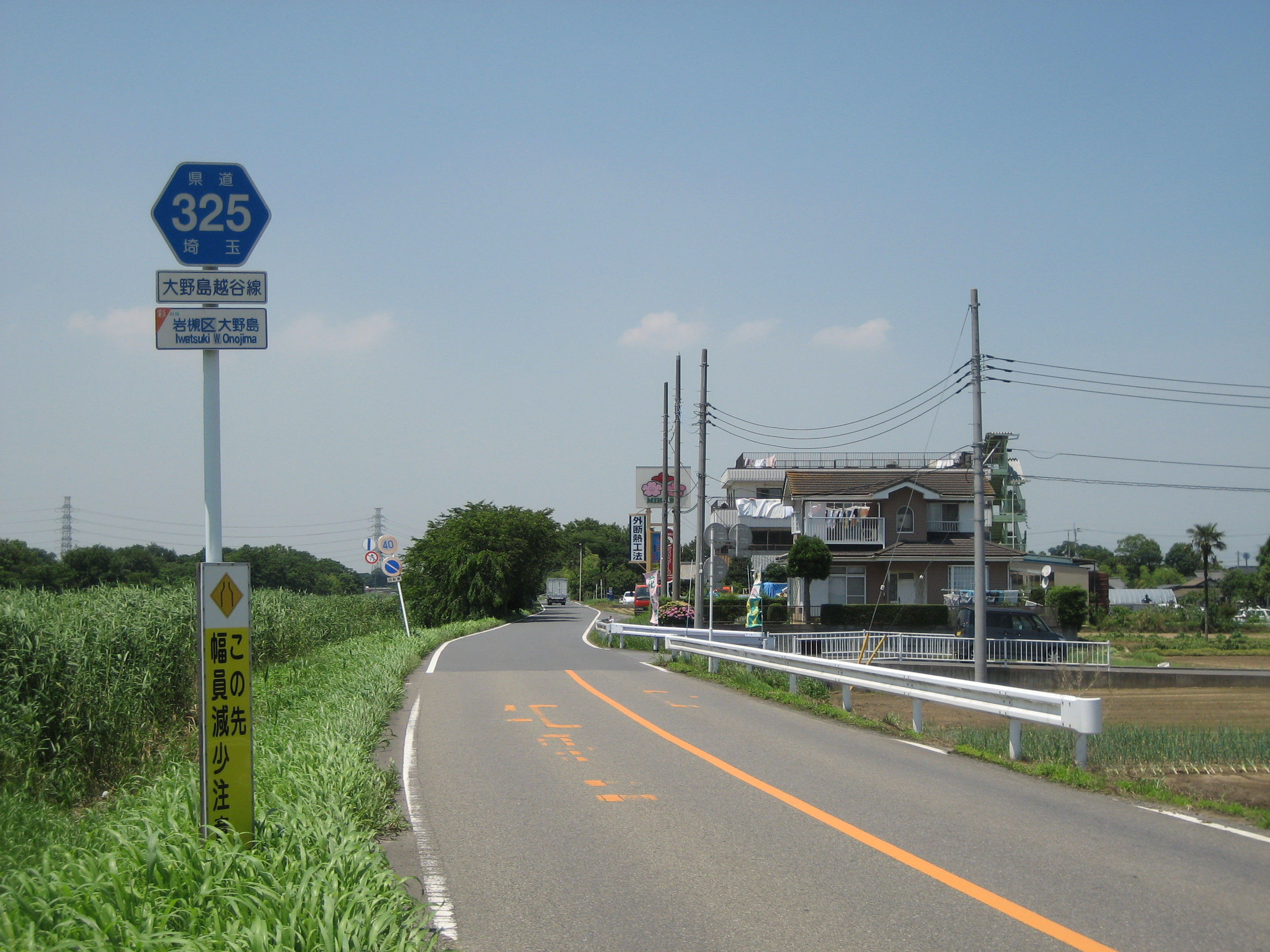 埼玉県道325号線さいたま市岩槻区内国道16号線方面を撮影